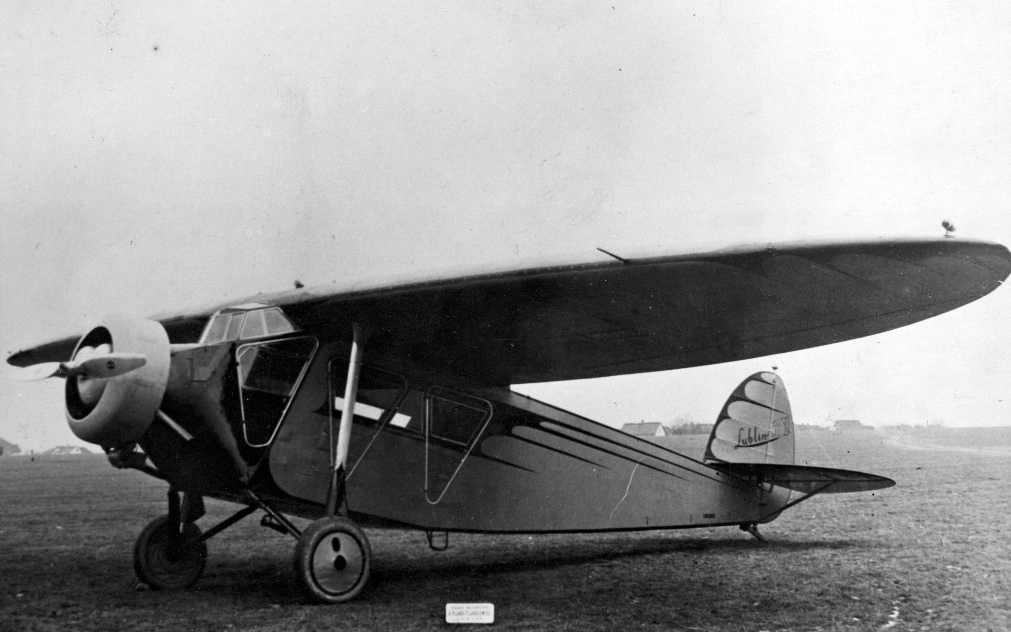 Samolot "Lublin R. XI" polskiej konstrukcji, wyprodukowany w Zakładach Mechanicznych E. Plage i T. Laśkiewicz w Lublinie dla komunikacji pasażerskiej.